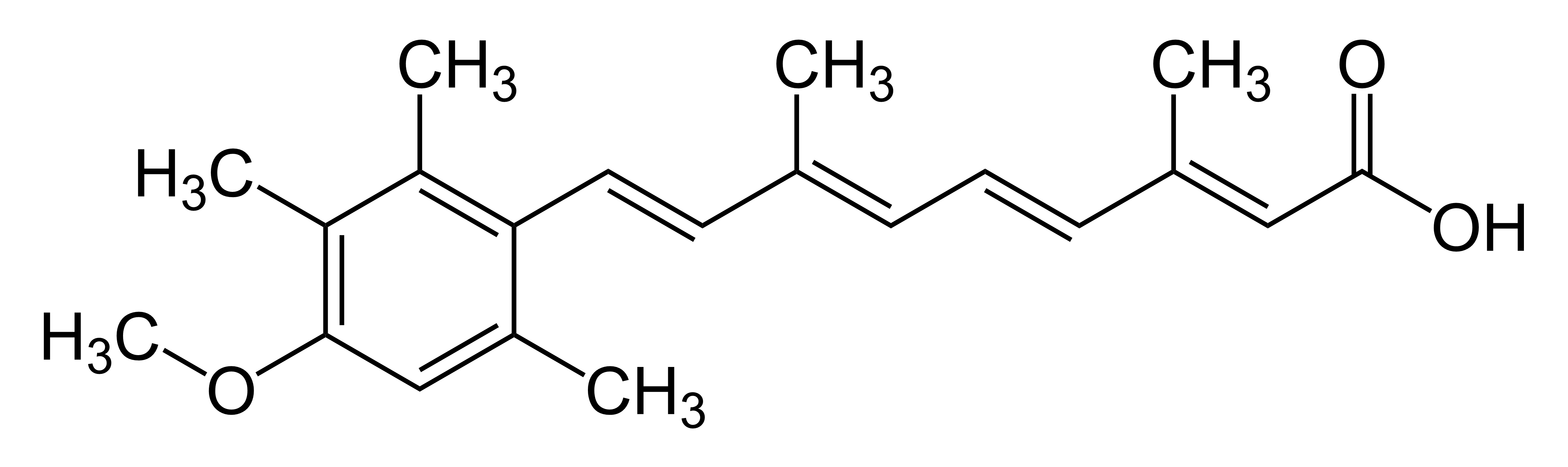 Struktur von Acitretin